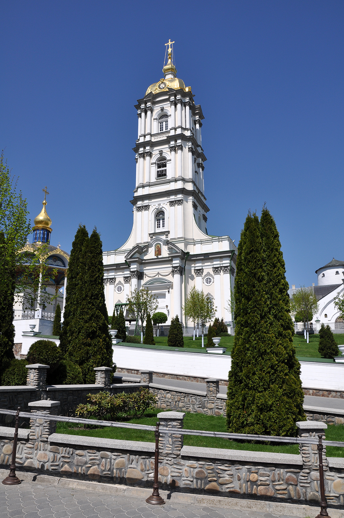 Дзвіниця, Почаїв, пл. Возз'єднання